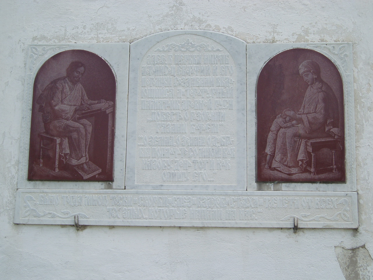 Памятная табличка на стене Собора Николая Чудотворца в Зарайске